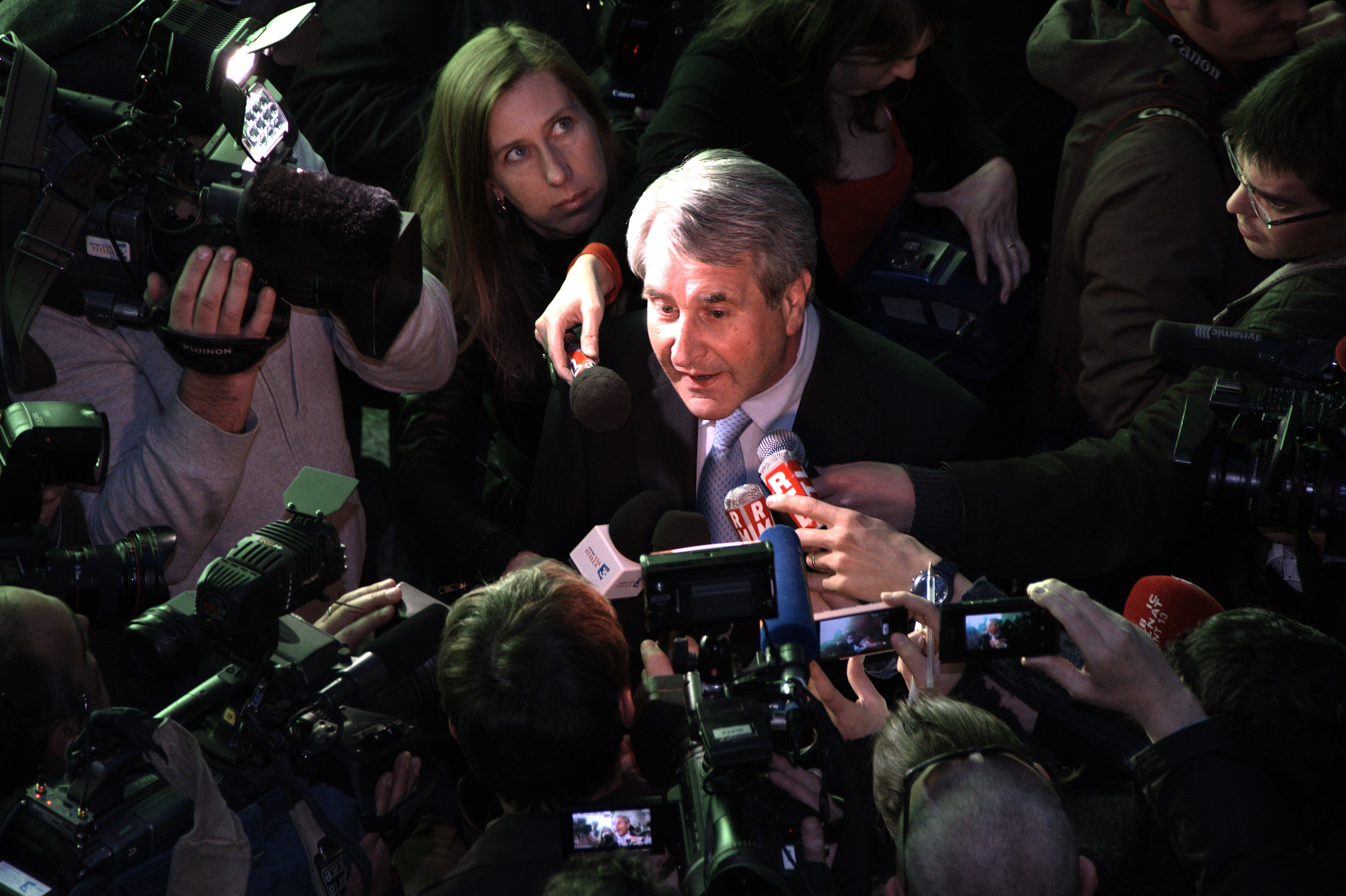 Philippe Richert répond à la presse lors de la soirée des résultats du référendum sur la Collectivité Territoriale d'Alsace.